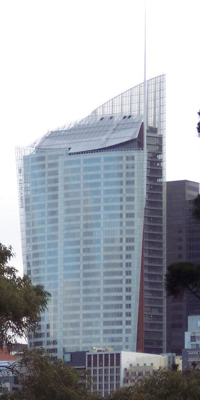 Небостъргача Аврора в Сидни.